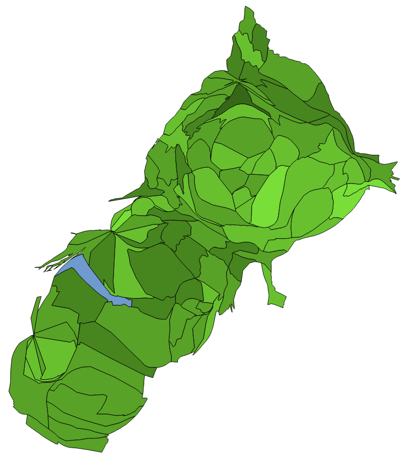 顏色對照表